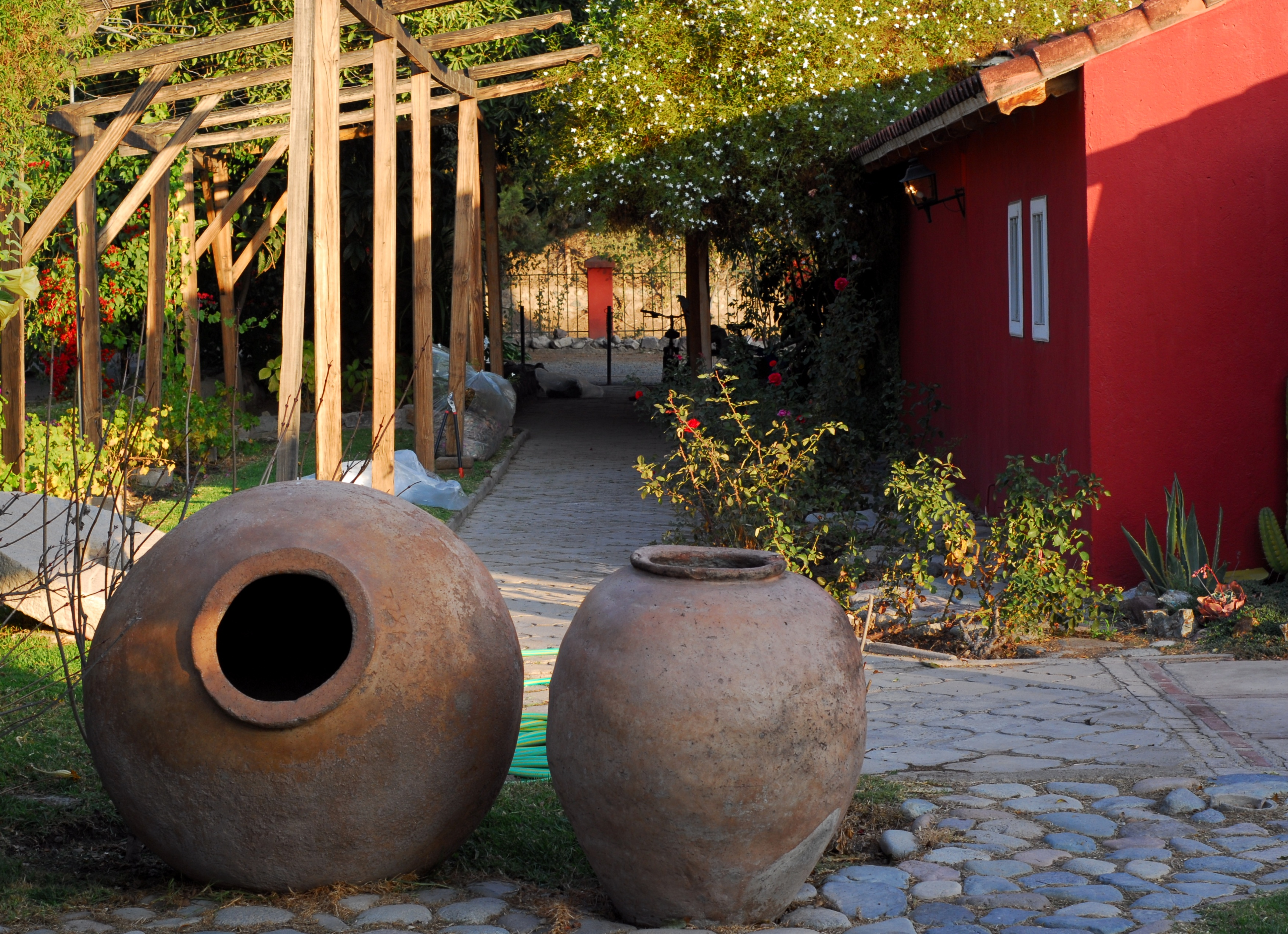 Pisco Capel Yard